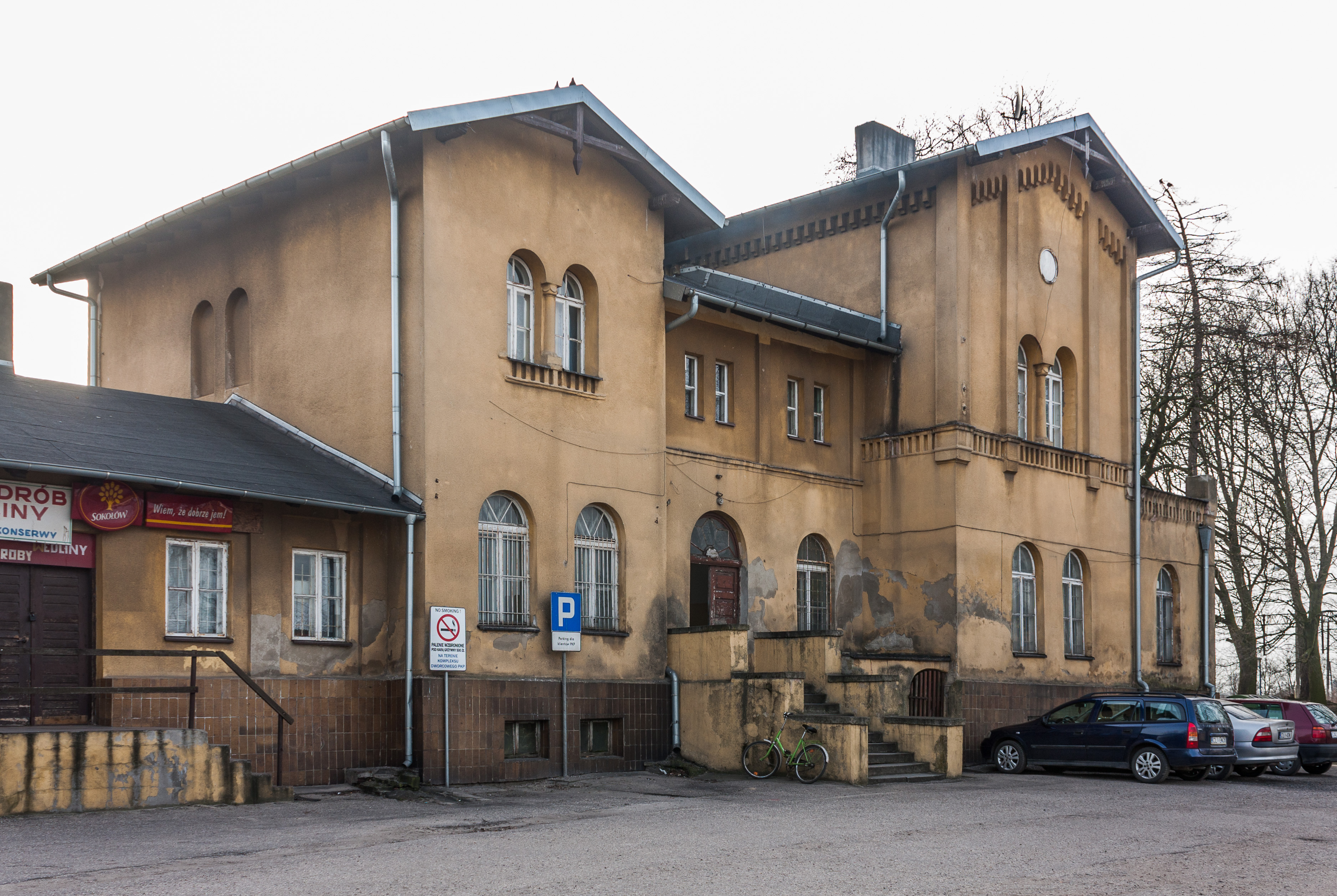 Waganiec - dworzec kolejowy "Nieszawa Waganiec" wraz z otaczającym układem zieleni, 1880-1890